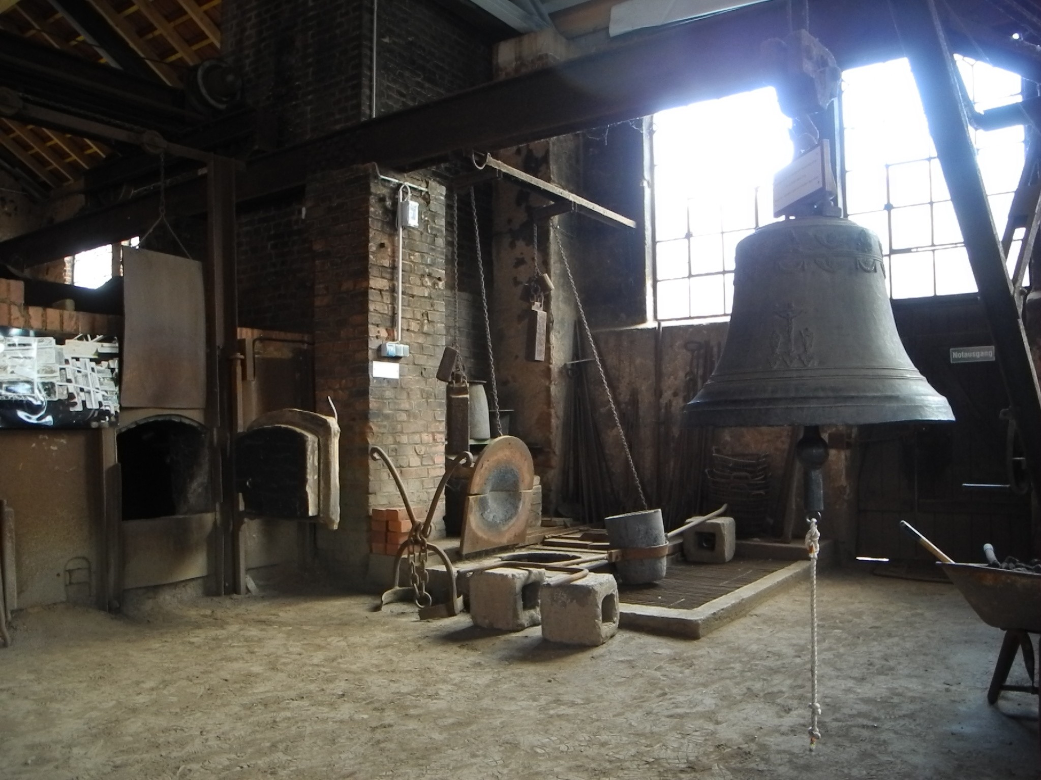 Saarburg - Glockengießerei Mabilon ist inzwischen ein Museum05